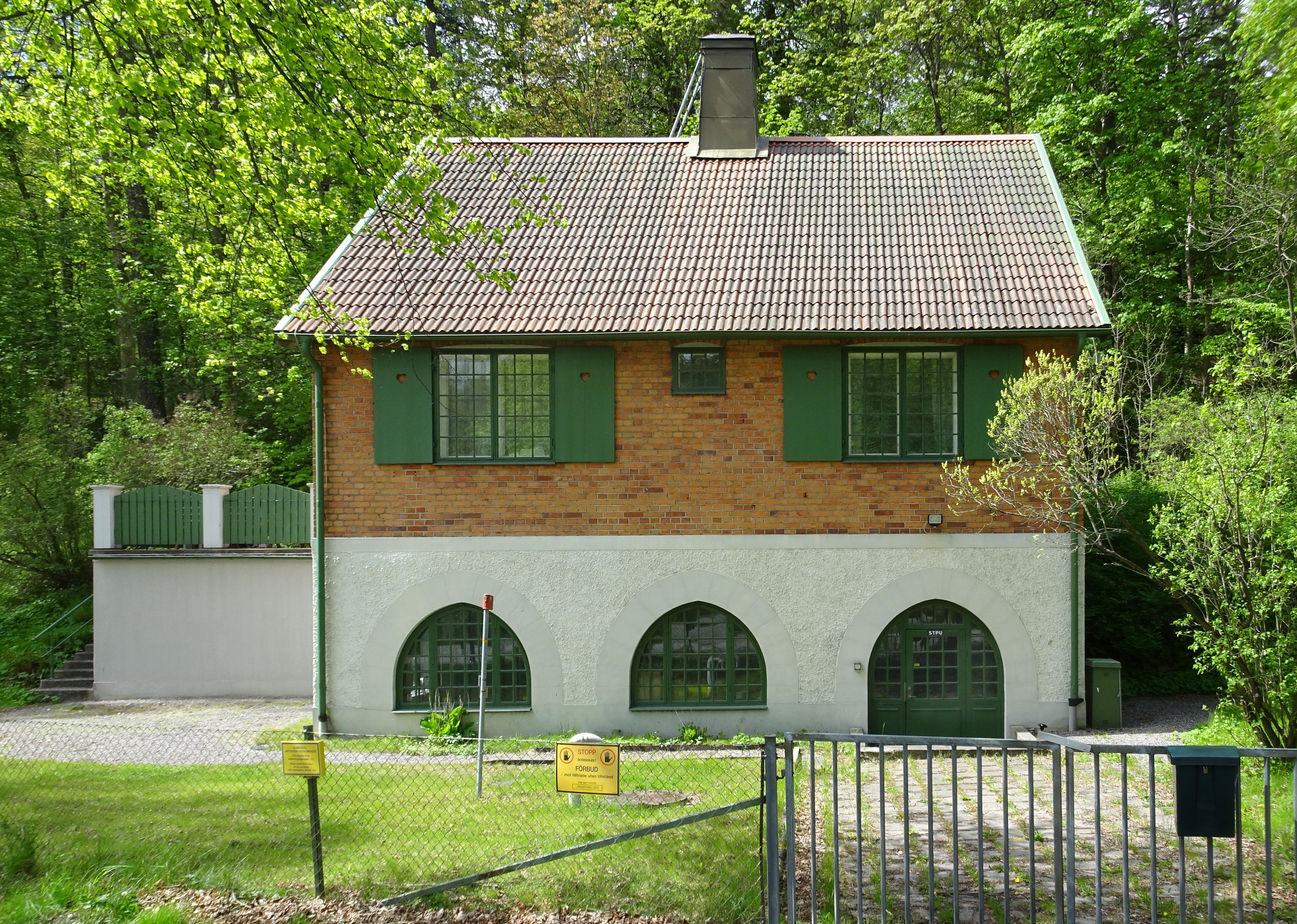 Pumphuset på Ulriksdals slottsområde, pumpade vatten till Stocksunds vattentorn